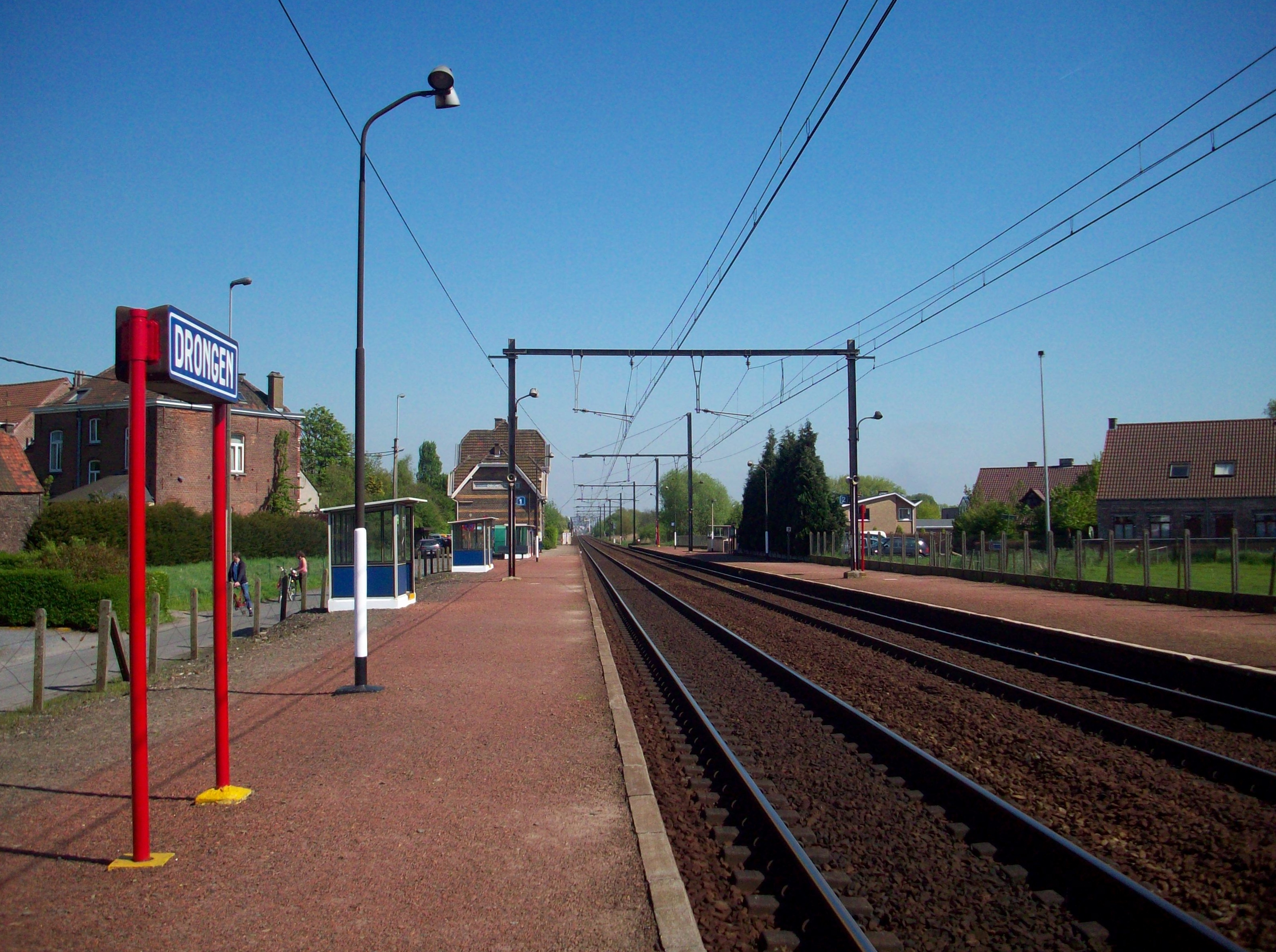 Station Drongen